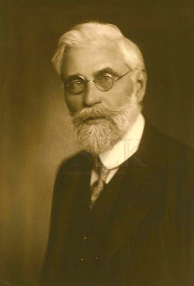 Vikár Béla (1859–1945) arcképe. Fénykép, Budapest, fotó: Strelisky Sándor, 1917 Országos Széchényi Könyvtár, Kézirattár.